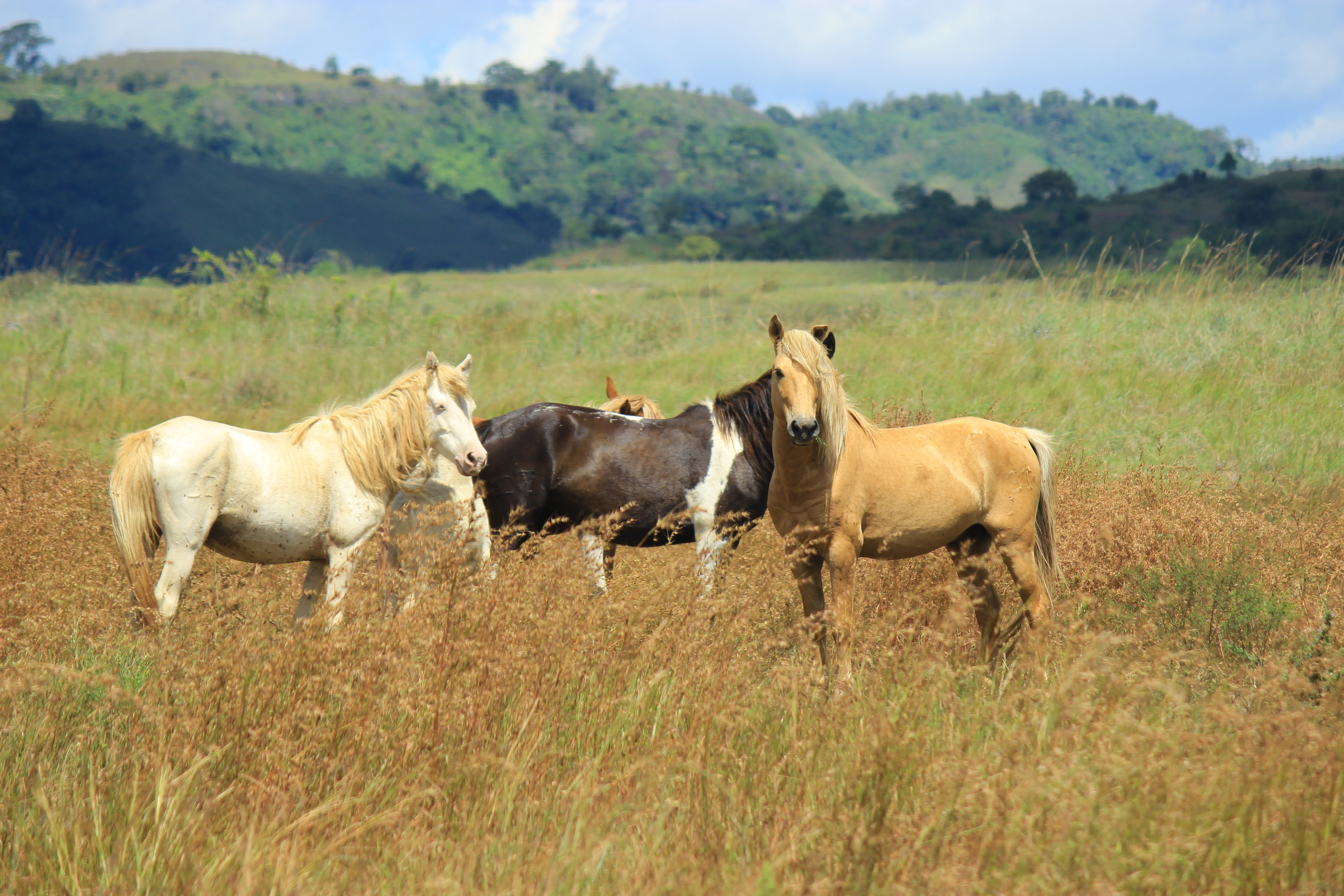 Pulau Sumba merupakan pulau bagian selatan Indonesia yang berada di Nusa Tenggara Timur. Pulau ini terkenal dengan kuda-kuda yang sengaja dilepas oleh pemiliknya untuk mencari makan. Terdapat puluhan hingga ratusan kuda yang dilepaskan di padang savana.